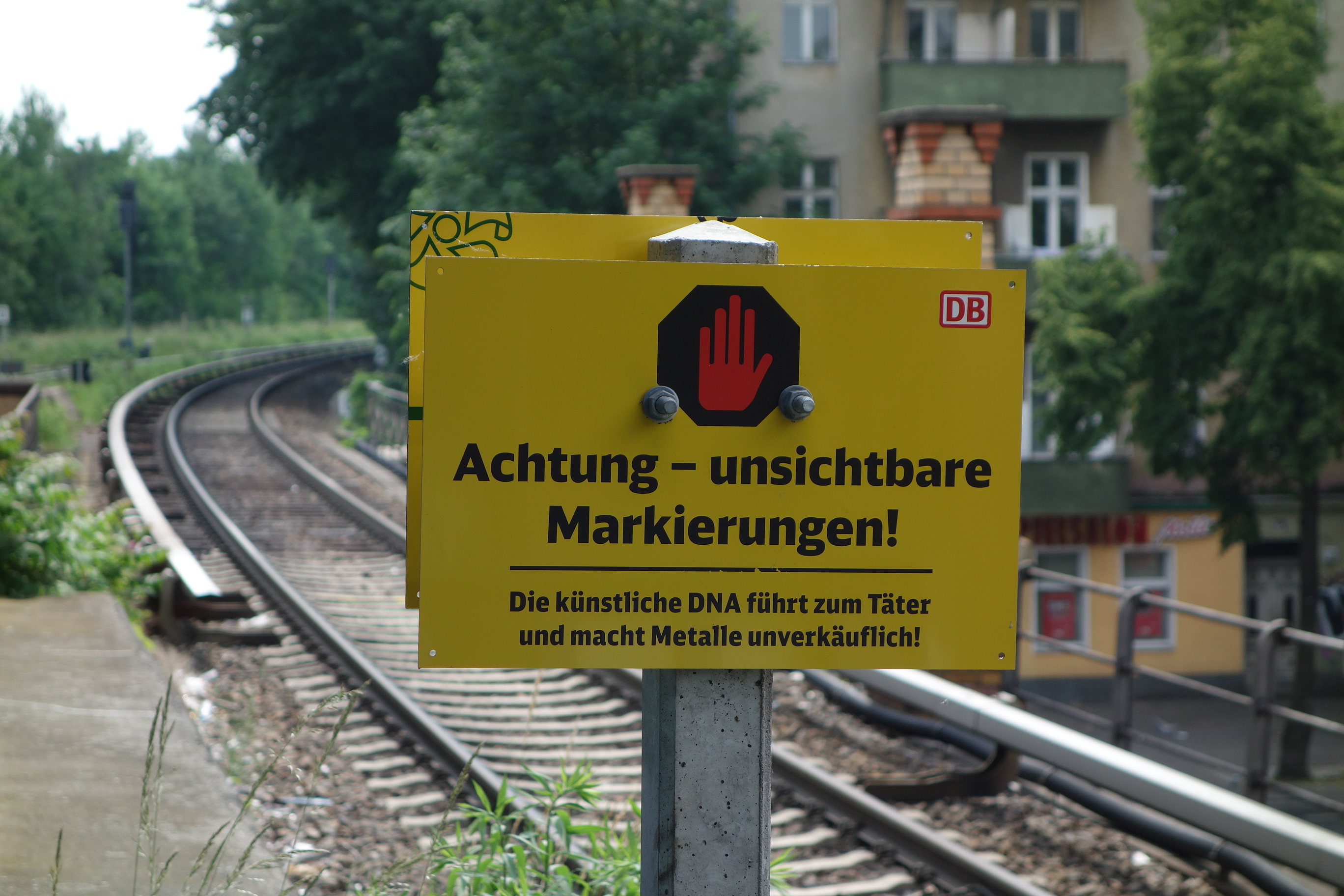 Bahnhof Berlin Wollankstraße, künstliche DNA